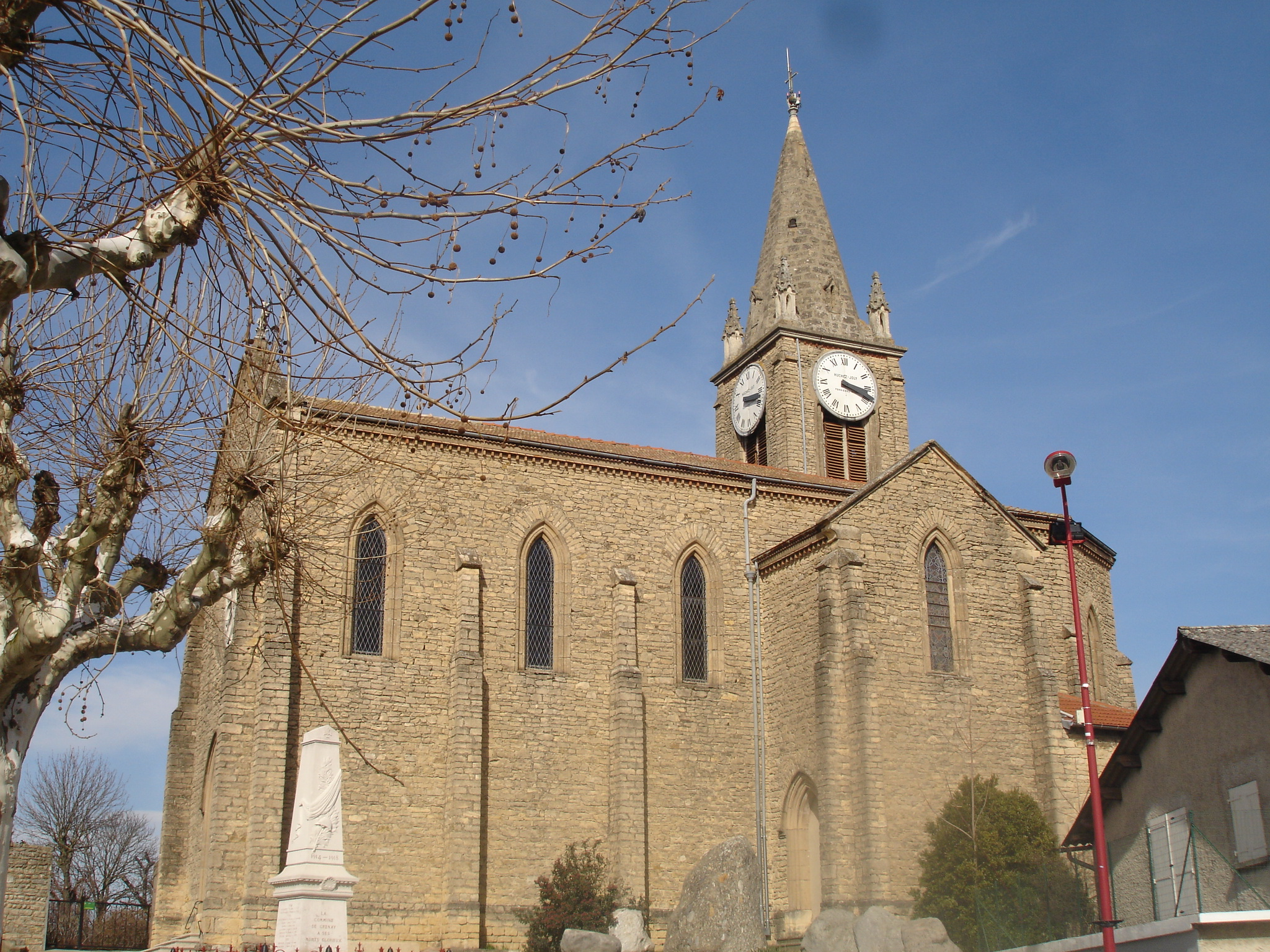 Grenay (38) : L'église, vue générale